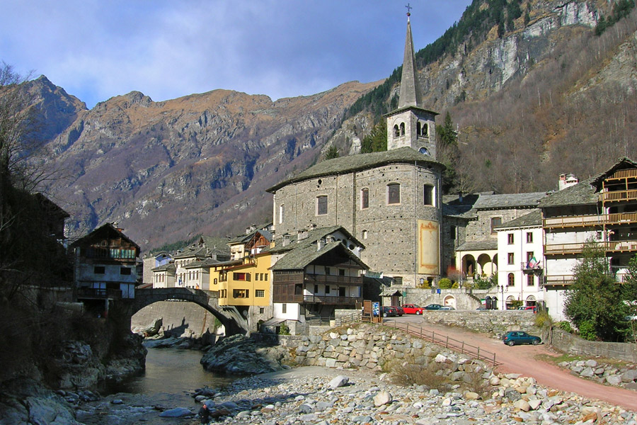 Veduta di Campertogno (VC)